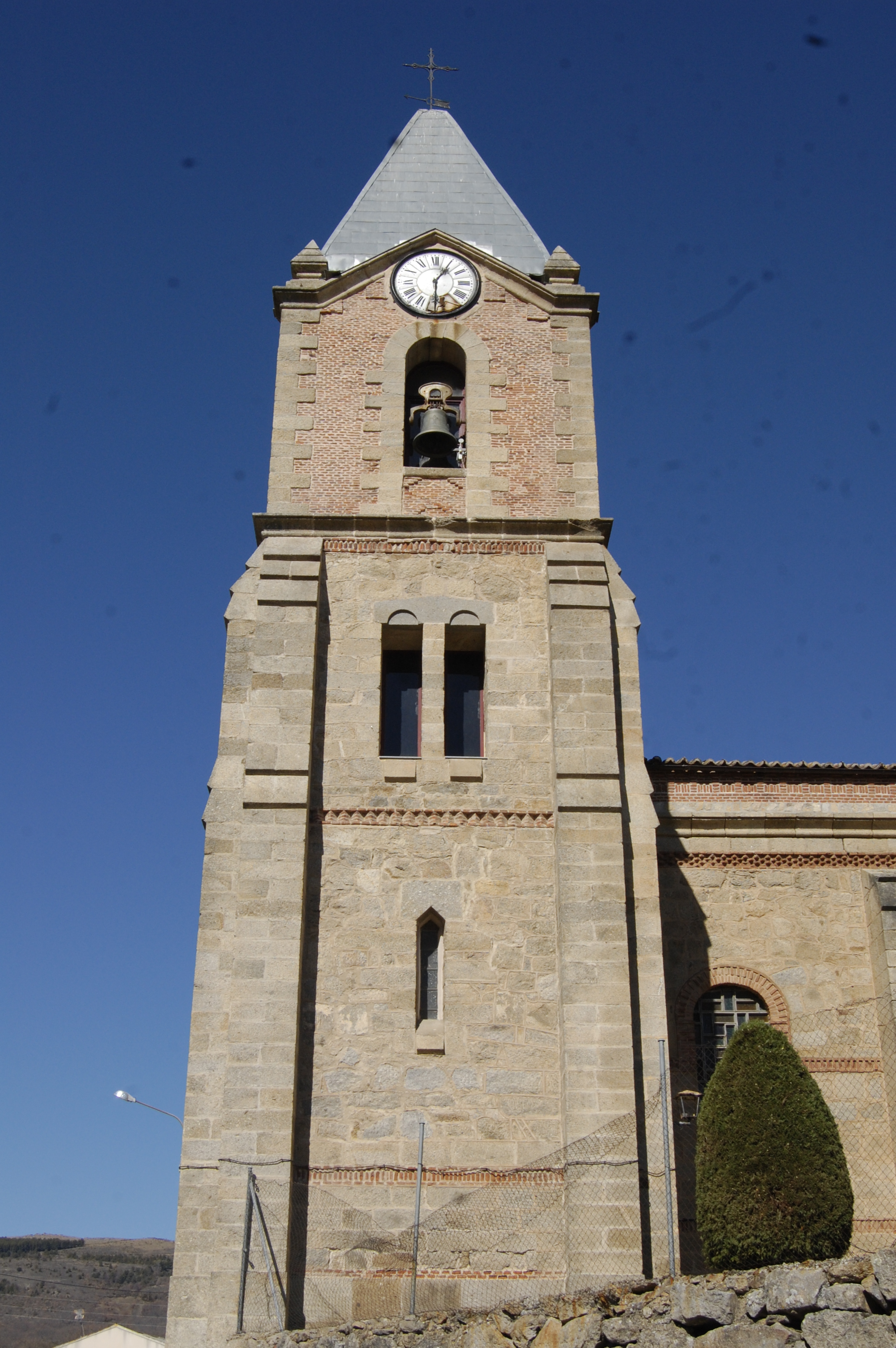 Iglesia parroquial de Santa Ana, en La Carrera, municipio de Ávila (España), construida a comienzos del siglo XX en piedra y ladrillo con una torre que recuerda las de las de iglesias centroeuropeas.